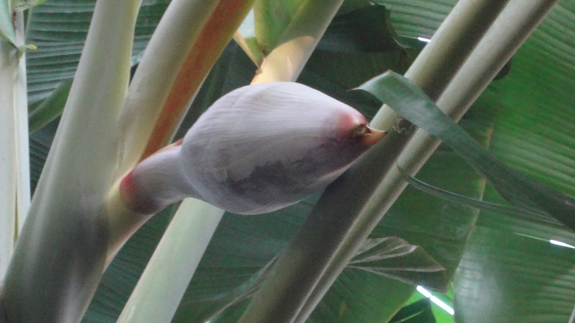 வாழைப்பூ